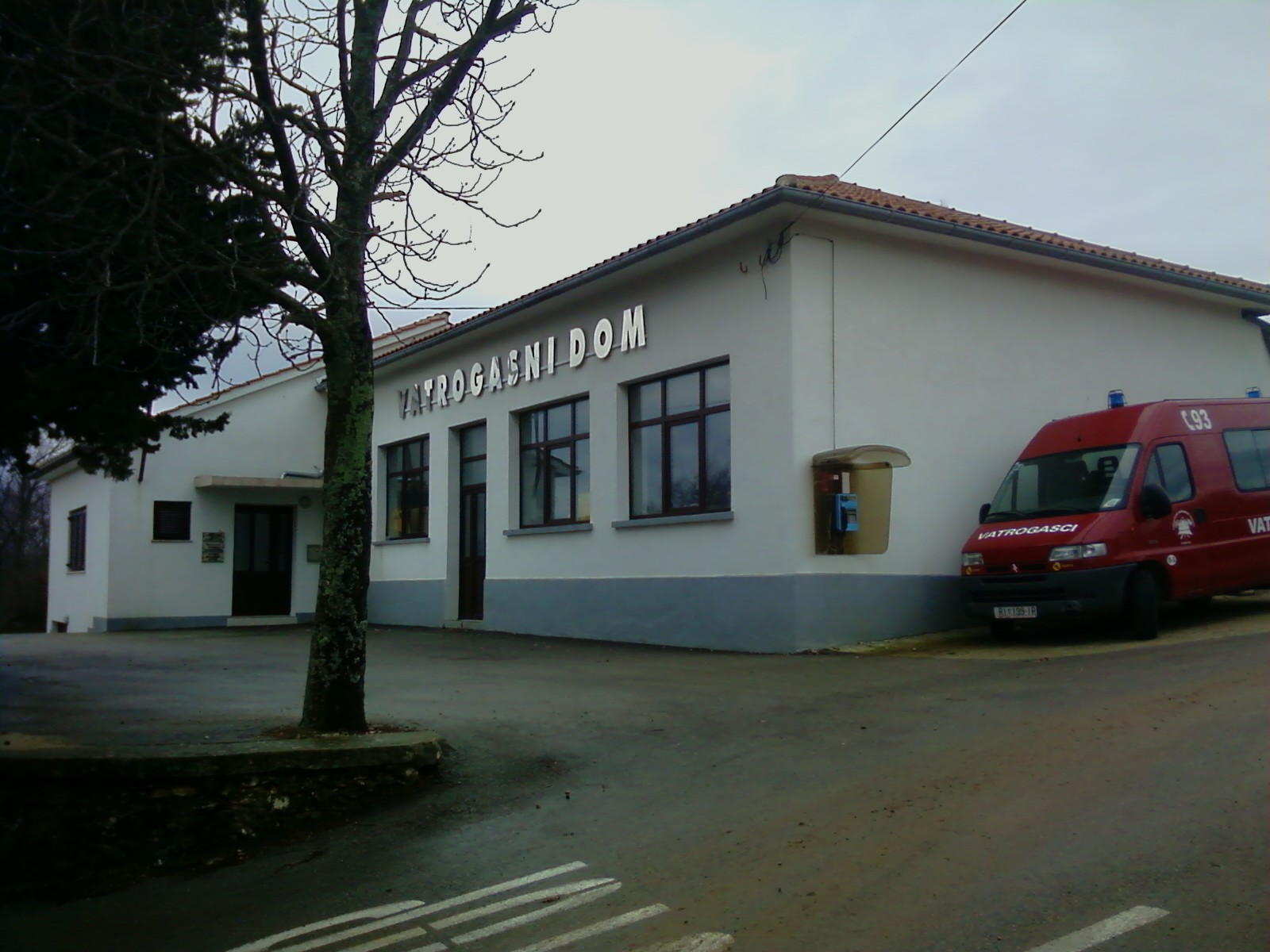 Vatrogasni dom općine Dobrinj u Svetom Vidu neposredno kraj Dobrinja